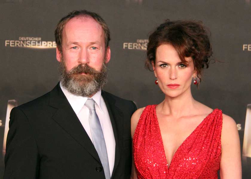 Preisträger Ulrich Noethen und Melika Foroutan beim Deutschen Fernsehpreis 2012